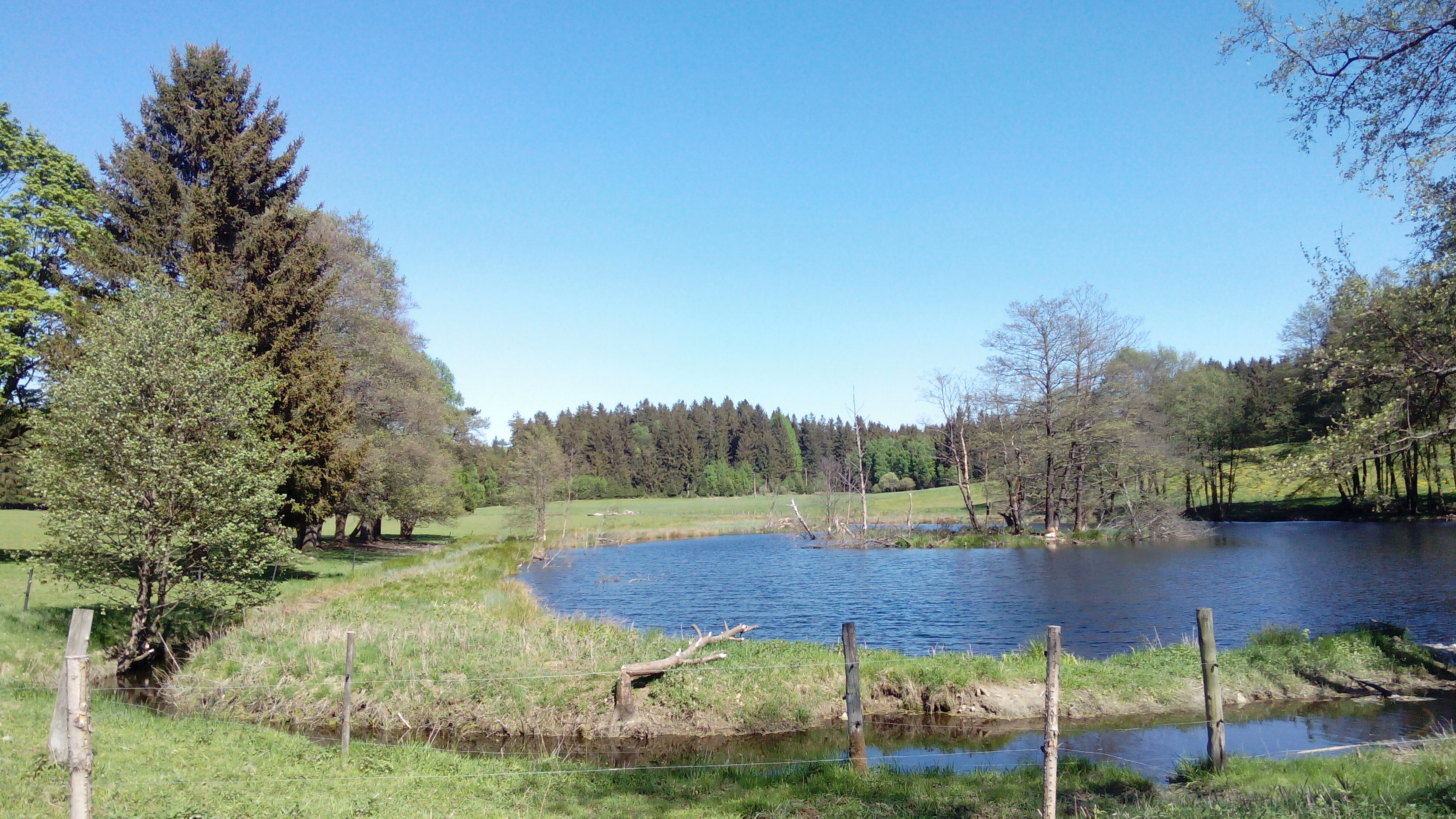 Nový rybník v zaniklé obci Zahájí (Waldheim) u Lesné, okres Tachov.